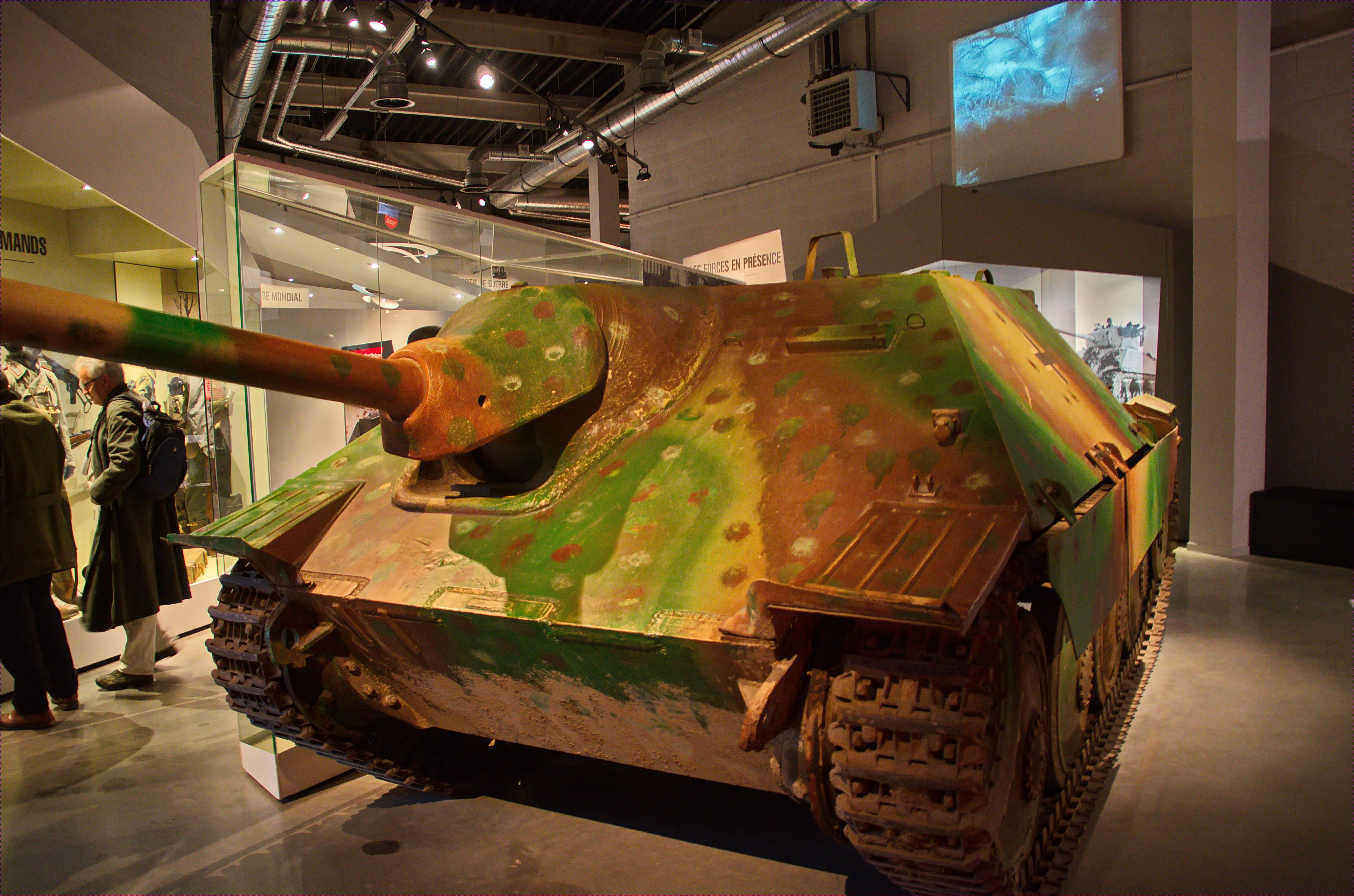 1448 - Belgientour 2015 - Bastogne